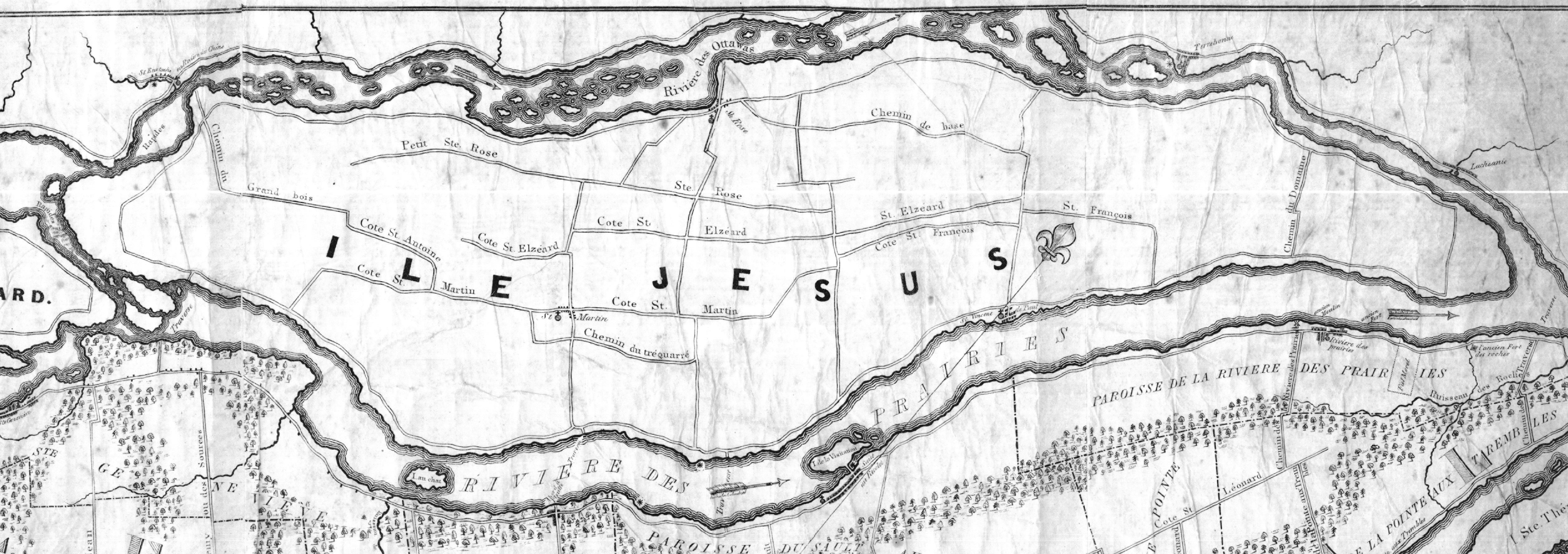 Carte de l'ile de Montréal : désignant les chemins publics, les paroisses les fiefs et les villages qui s'y trouvent, le canal de Lachine, les différentes parties de l'Ile qui ne sont pas encore en état de culture &c. &c